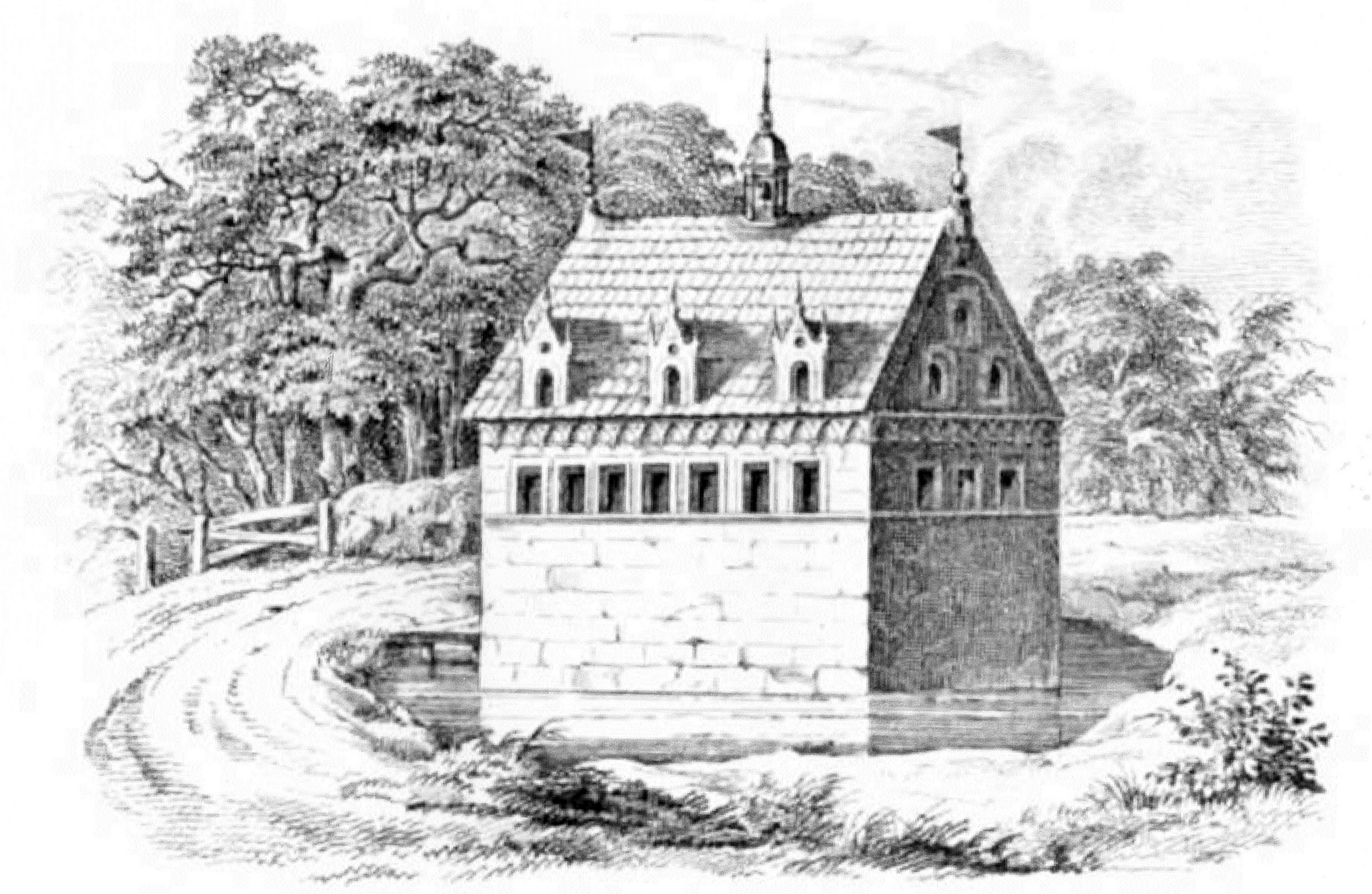 Gutshaus Höltenklinken, Zeichnung von Köhler und Roisternitz 1862